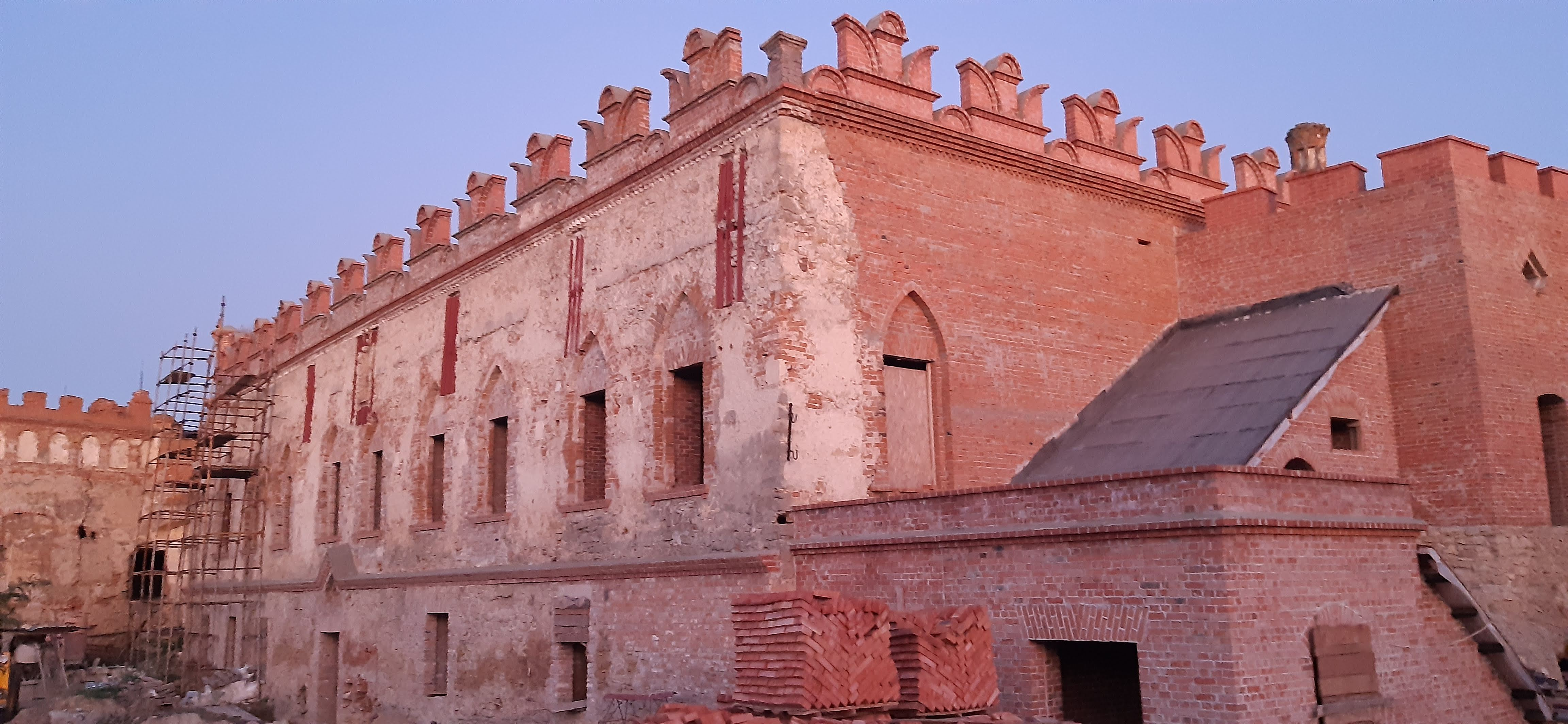 Палац Сенявських-Чарторийських у ході реставрації, 2019 р. Меджибіж, вул. Замкова, 1.